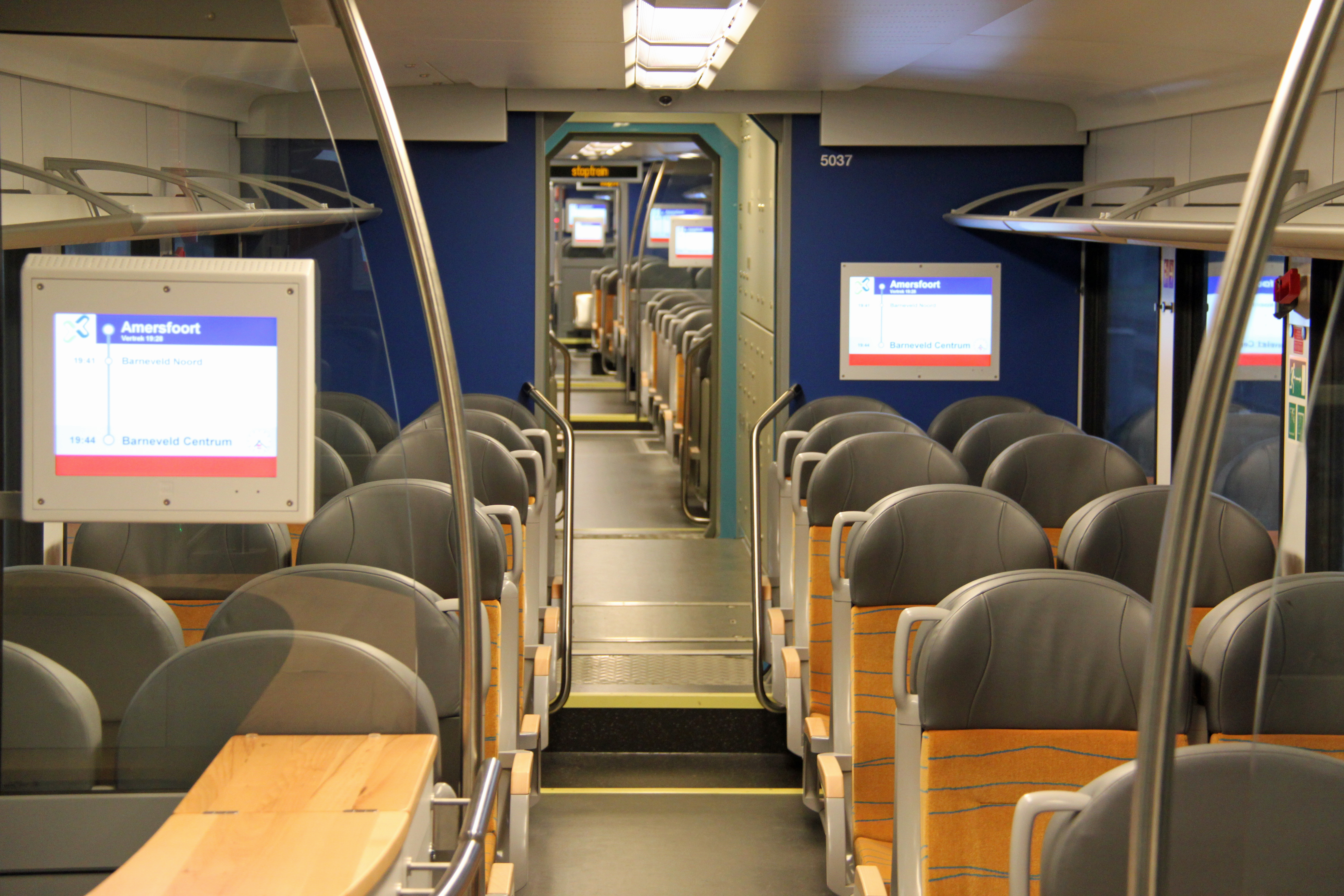 Interieur 2e klasse GTW Connexxion